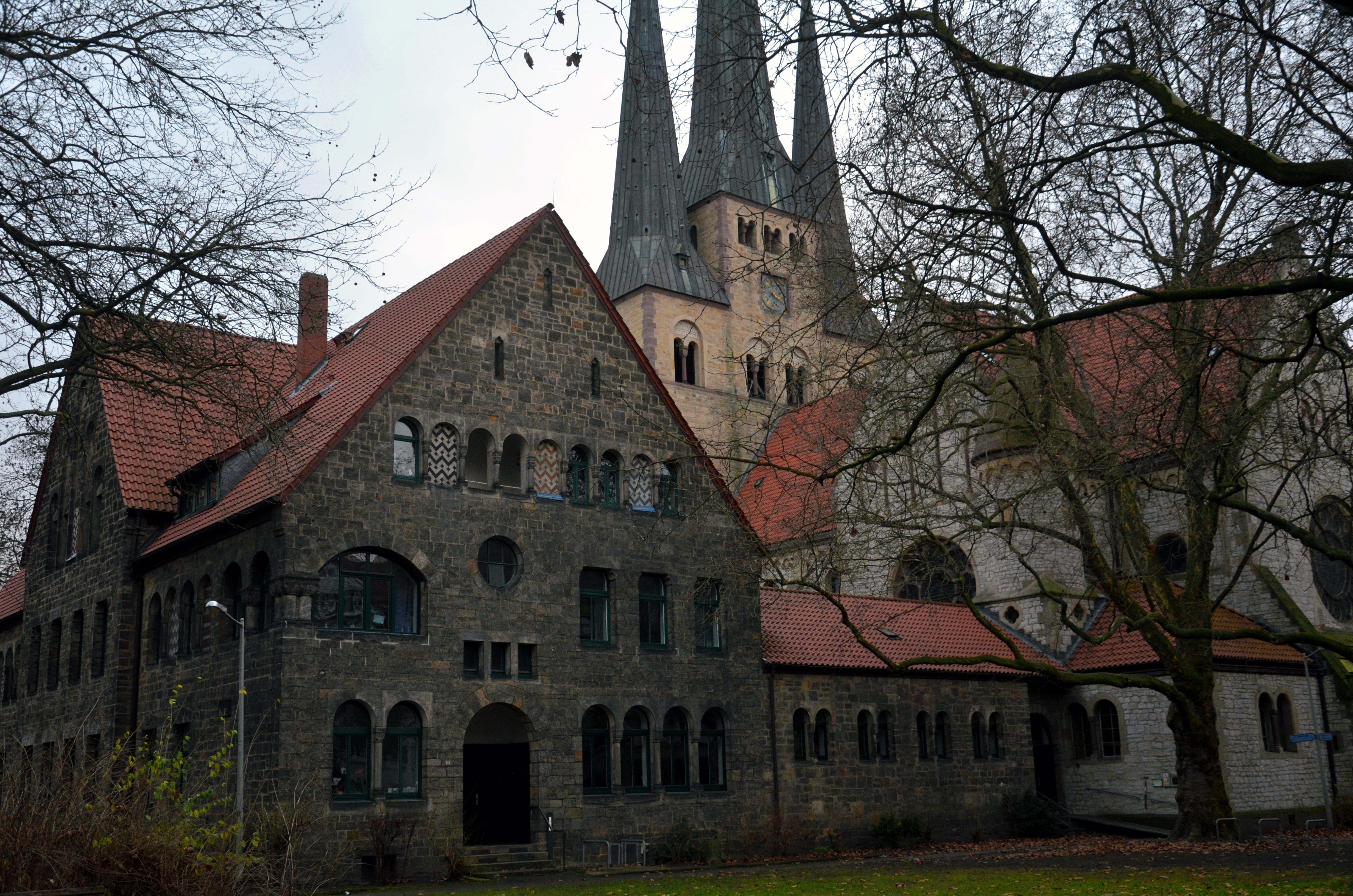 Der Bethlehemplatz in Hannover, Stadtteil Linden-Nord, hier das wie eine nordische Trutzburg wirkdende, 1904 bis 1906 von dem Architekten Karl Mohrmann errichtete Ensemble aus Pfarrhaus und Bethlehemkirche ...